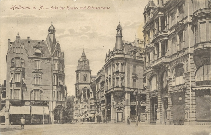 Heilbronn Kaiserstraße 23 1/2 (Schirmfabrik Hermann Lade), Kaiserstraße 25 (Modegeschäft M. Schneider), Kiliansplatz 1